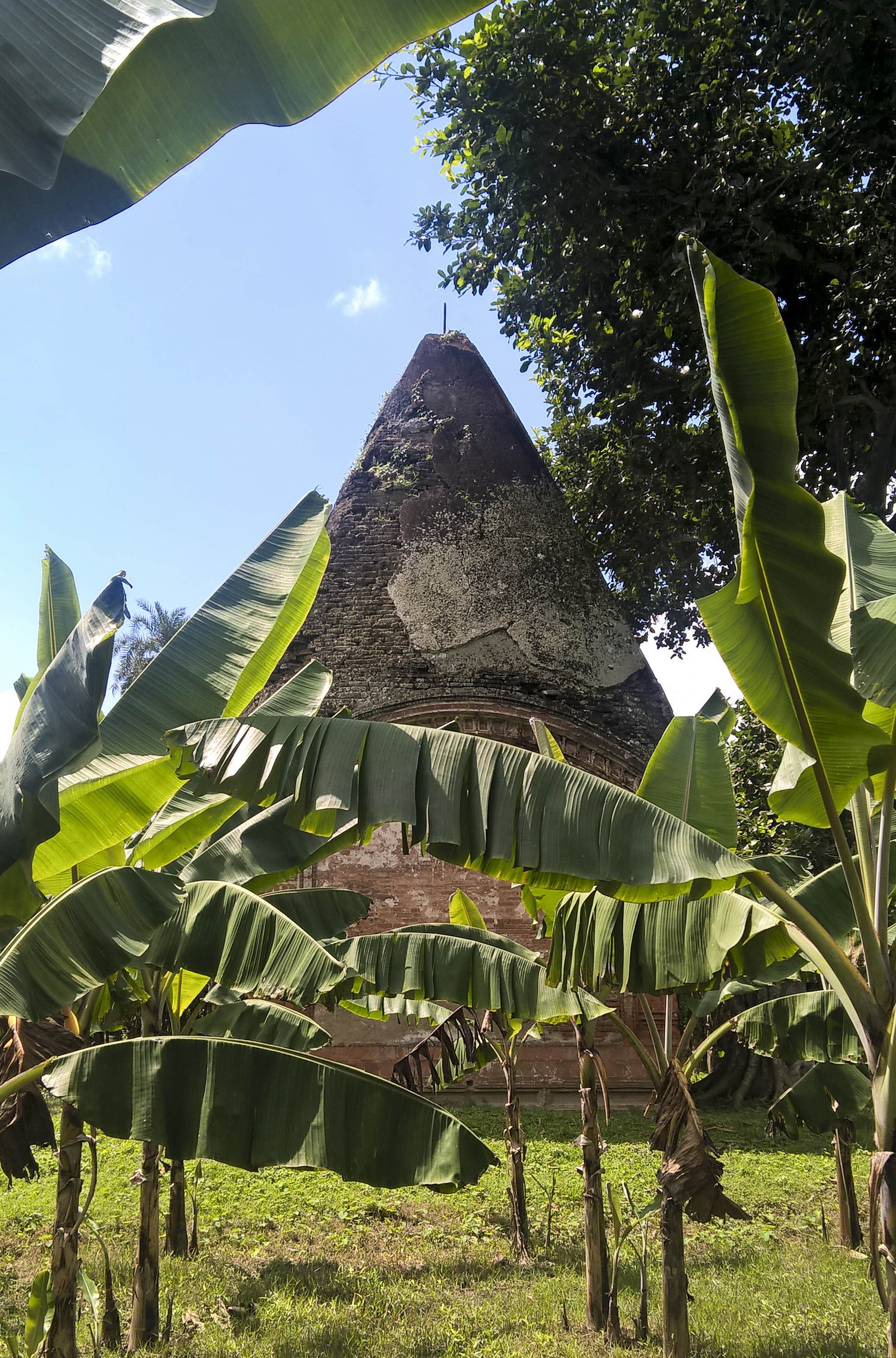 শিব মন্দির বা খিতিশ চন্দ্রের মঠ, পুঠিয়া, রাজশাহীর অন্যতম প্রত্নতাত্বিক স্থাপনা হিসেবে বিবেচিত। পুঠিয়া বাজারের ১.৫ কিলোমিটার পশ্চিমে কৃষ্ণপুর গ্রামে ছোট আকৃতির এ মন্দিরটি অবস্থিত। স্থানীয়ভাবে খিতিশ চন্দ্রের মঠ হিসাবে পরিচিত হলেও প্রকৃতপক্ষে এটি একটি শিব মন্দির। বর্গাকারে নির্মিত এই মন্দিরের প্রতিটি বাহুর দৈর্ঘ্য ৪.২৫ মিটার।